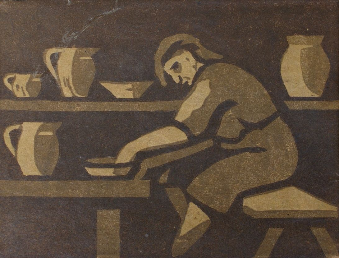 Joanna Konarzewska - "Garncarka" - drzeworyt barwny - Lata 50-te XX wieku